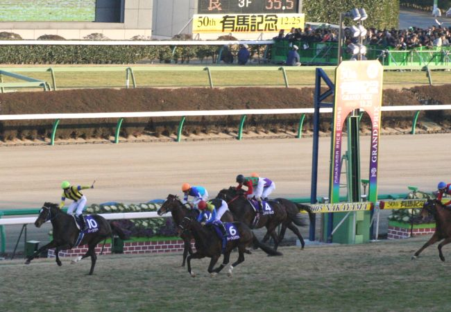 第50回有馬記念（2005年12月25日撮影、中山競馬場）